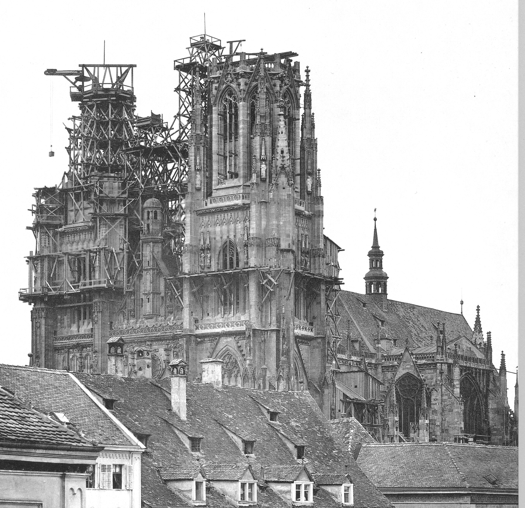 Die Regensburger Domtürme im Frühjahr 1865, historisches Foto im Dioezesanmuseum Regensburg.